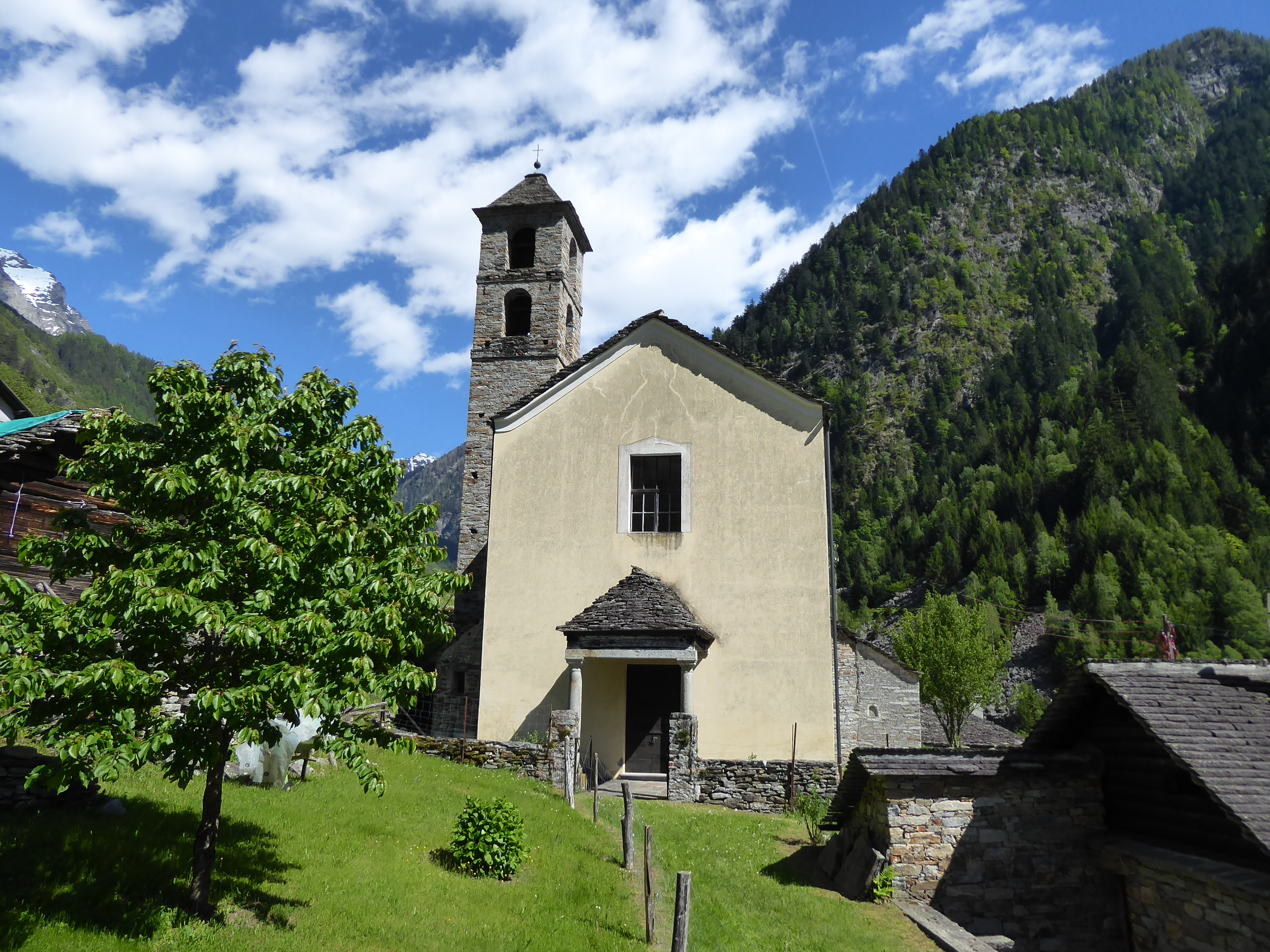 Kirche San Giovanni Battista in Pontirone bei Biasca im Tessin